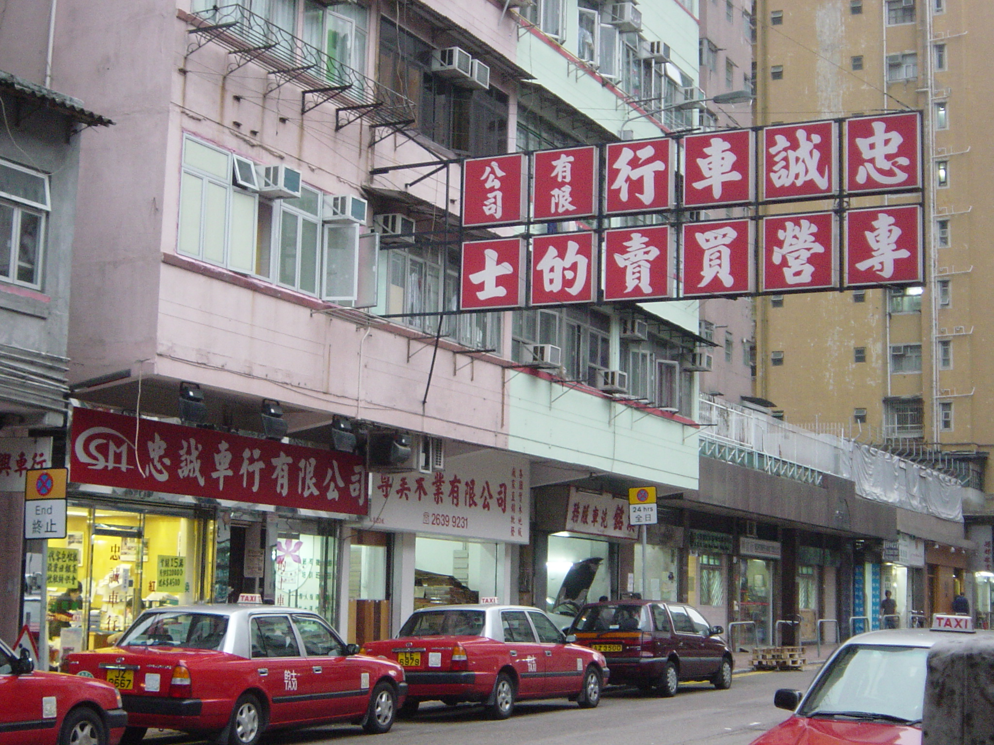 進行香港的士買賣的車行。Hong kong's taxi sale company.